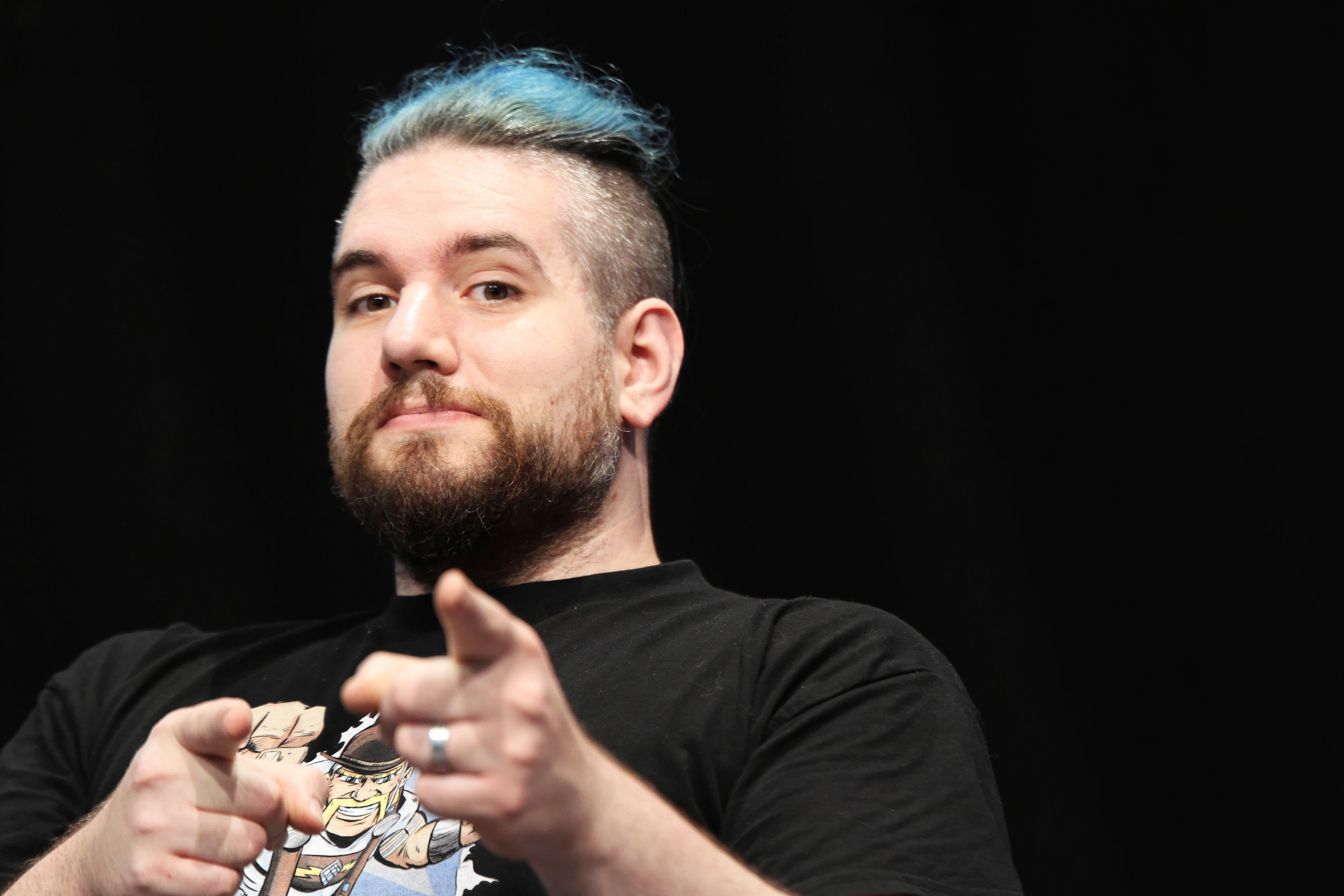 Bilder von der Comic Con Germany 2019 in Stuttgart